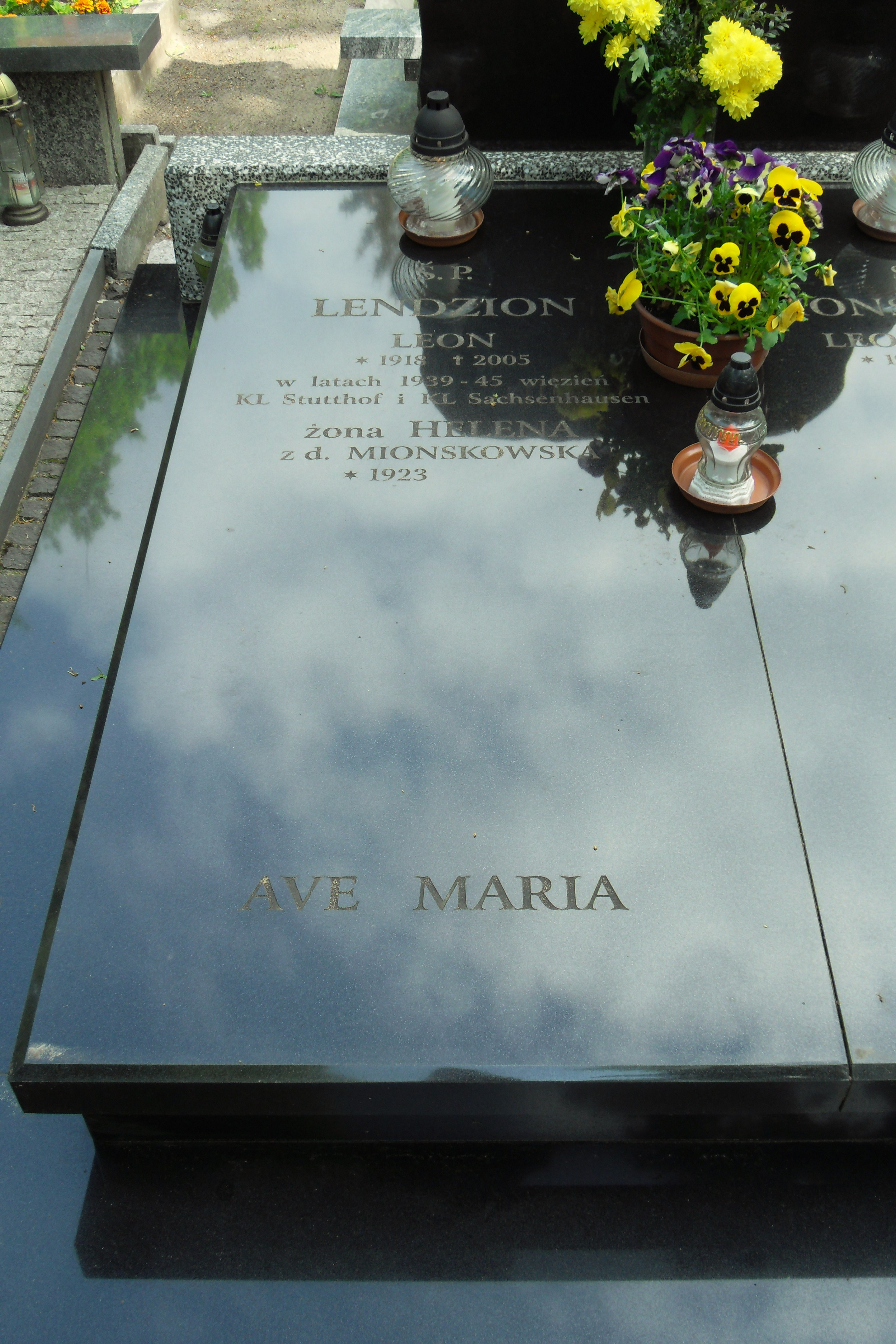 Gdańsk Oliwa. Cmentarz Oliwski, grób inżyniera Leona Lendziona (1918-2005).